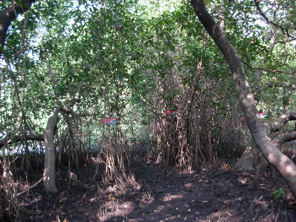 മംഗളവനത്തിലെ കണ്ടൽ മരങ്ങൾ